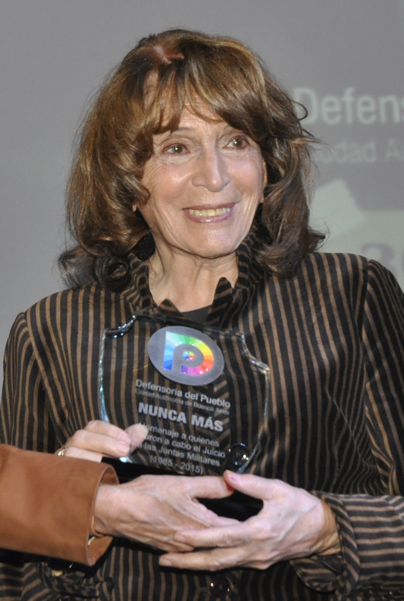 Magdalena Ruiz Guiñazú en una reunión de la Defensoría de la Ciudad de Buenos Aires.